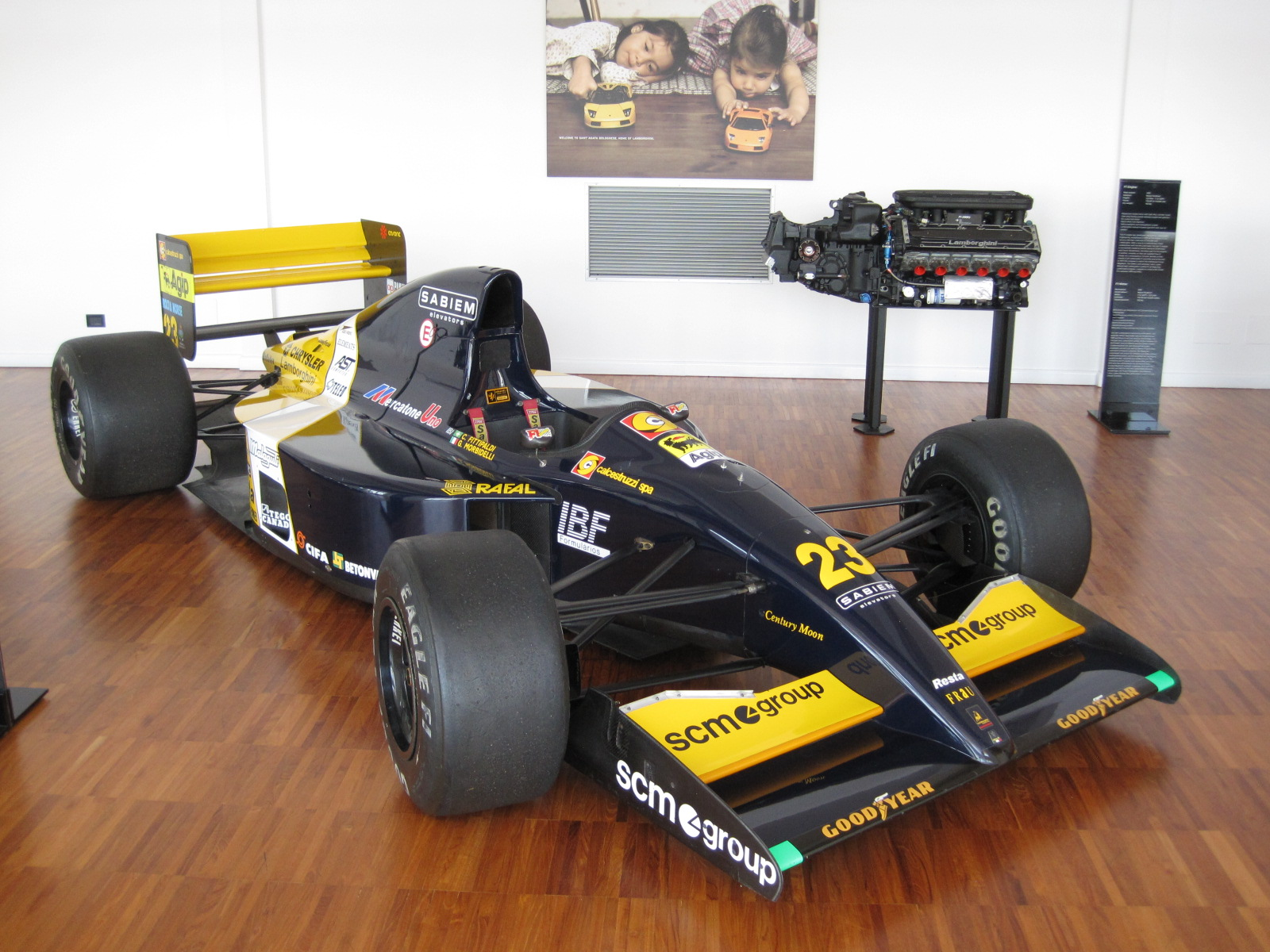 Musée Lamborghini - Minardi F1 M. 191/L - 03 - Saison 1992